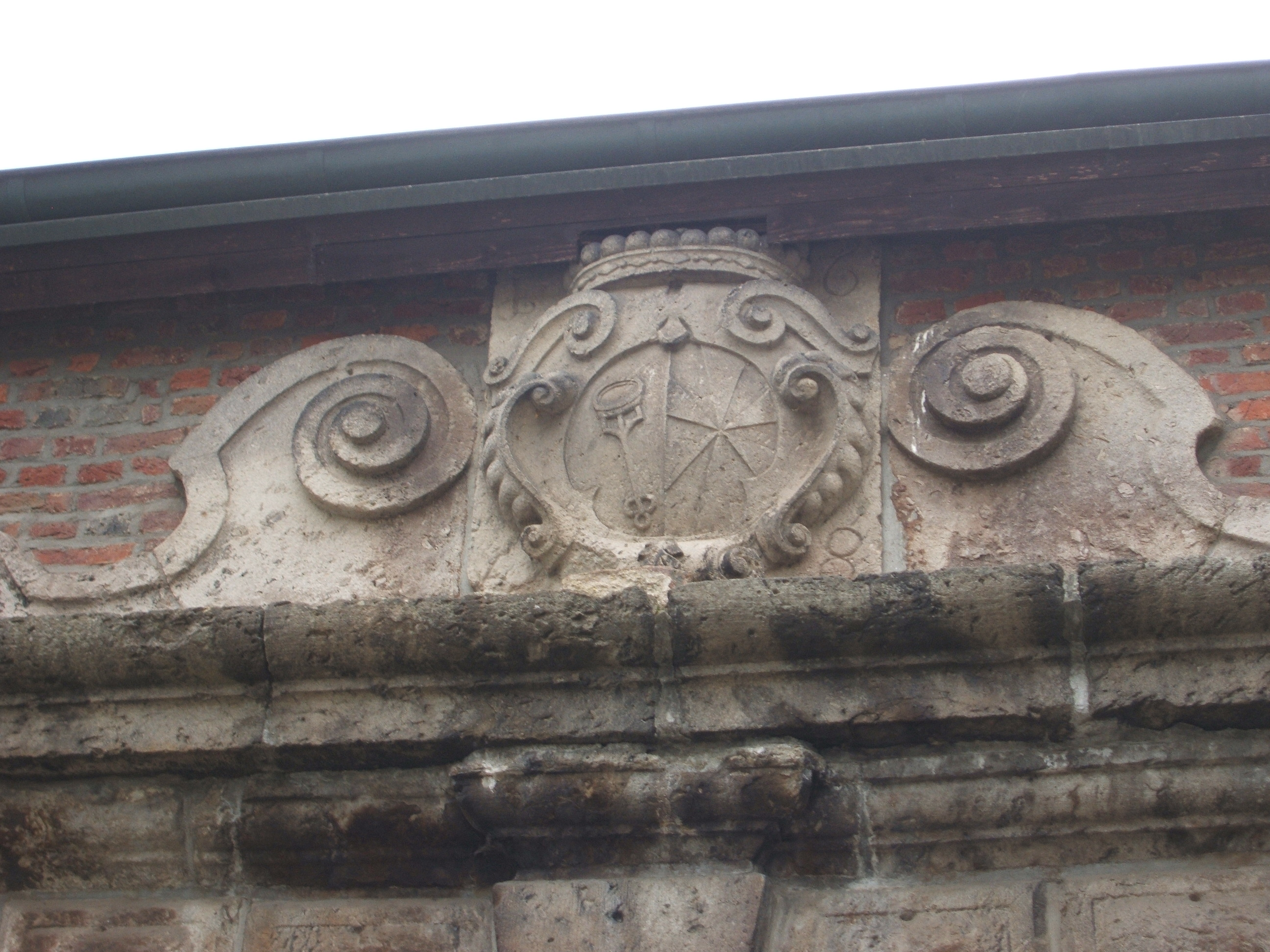 Coat of Arms at portal of Groß-Winkelhausen